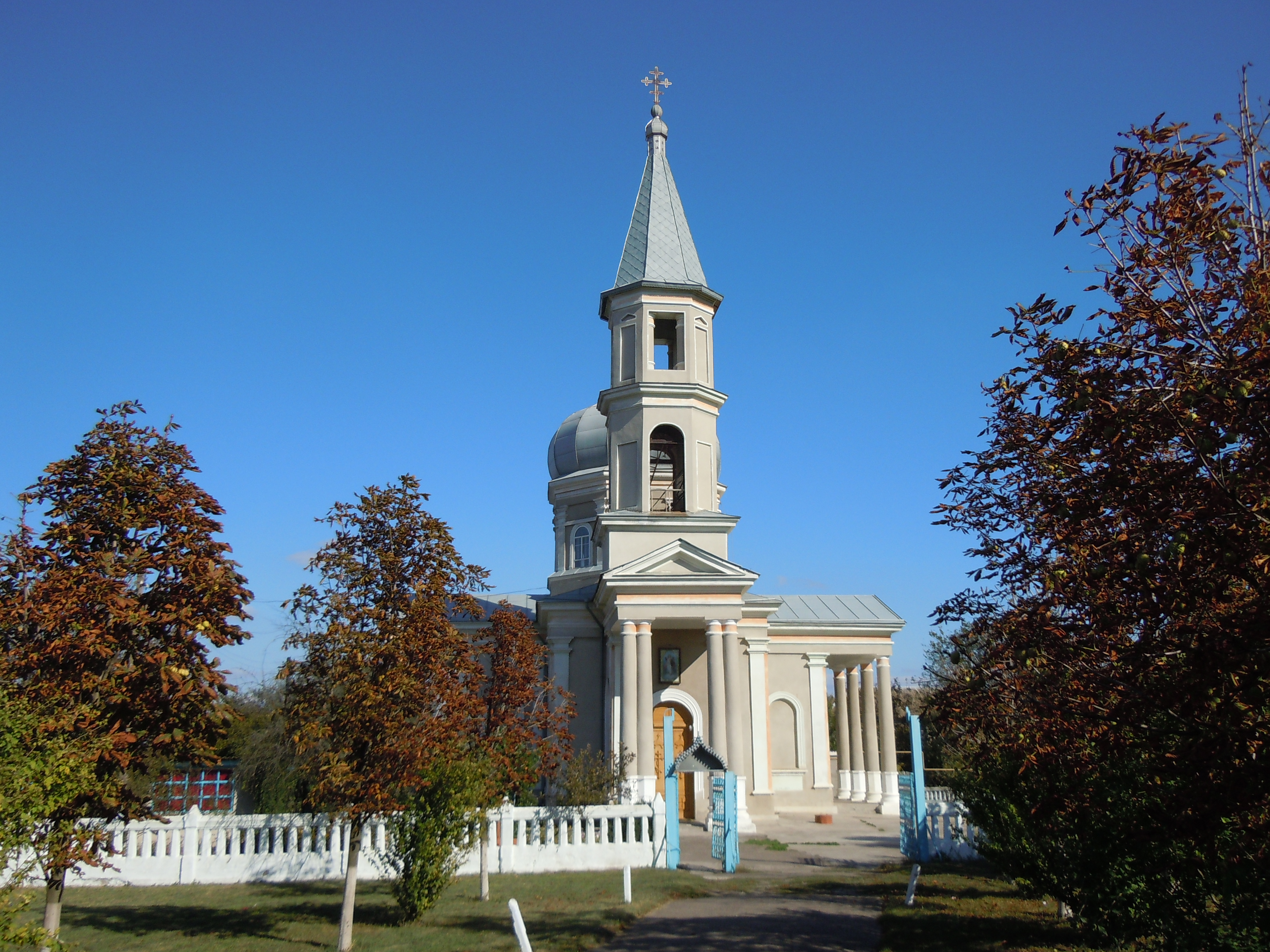 Михайлівська церква, с. Утконосівка